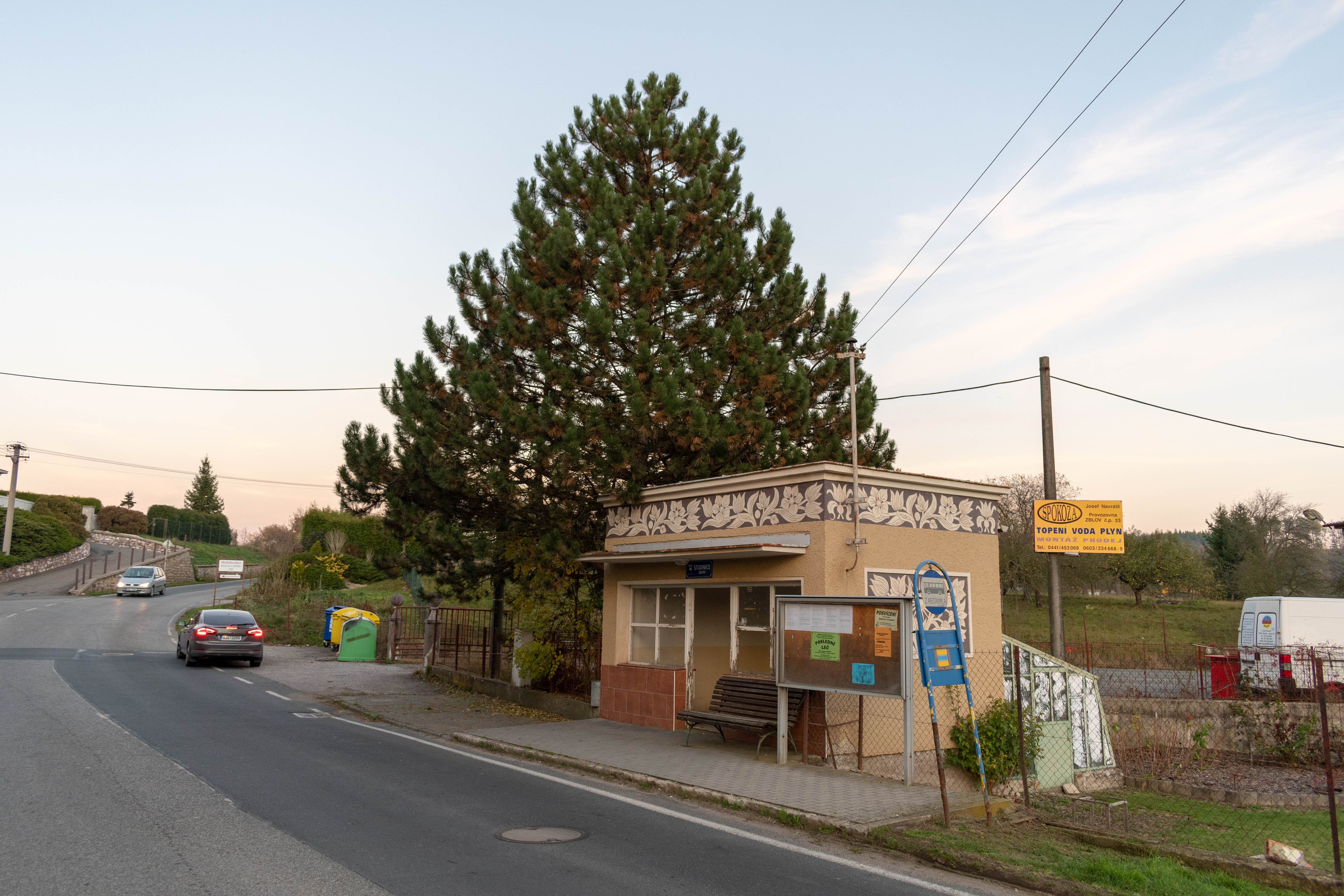 Autobusová zastávka v obci Zblov